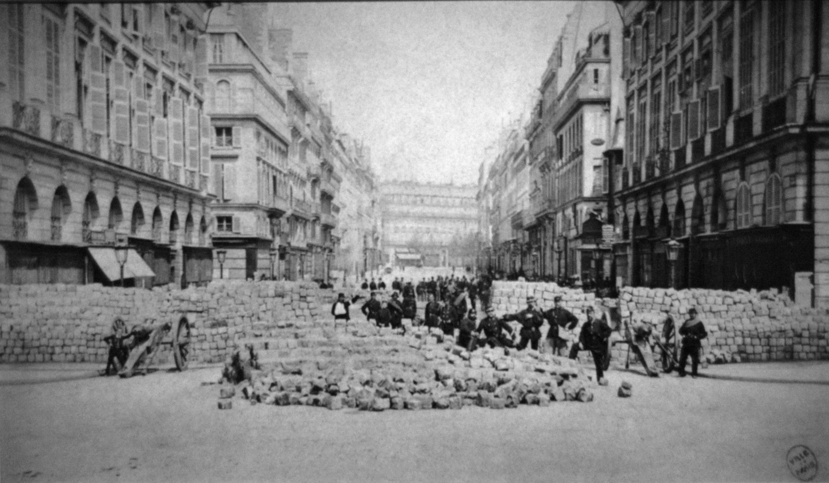 Barricade de la Place Vendôme, rue de la Paix durant la Commune de Paris de 1871.